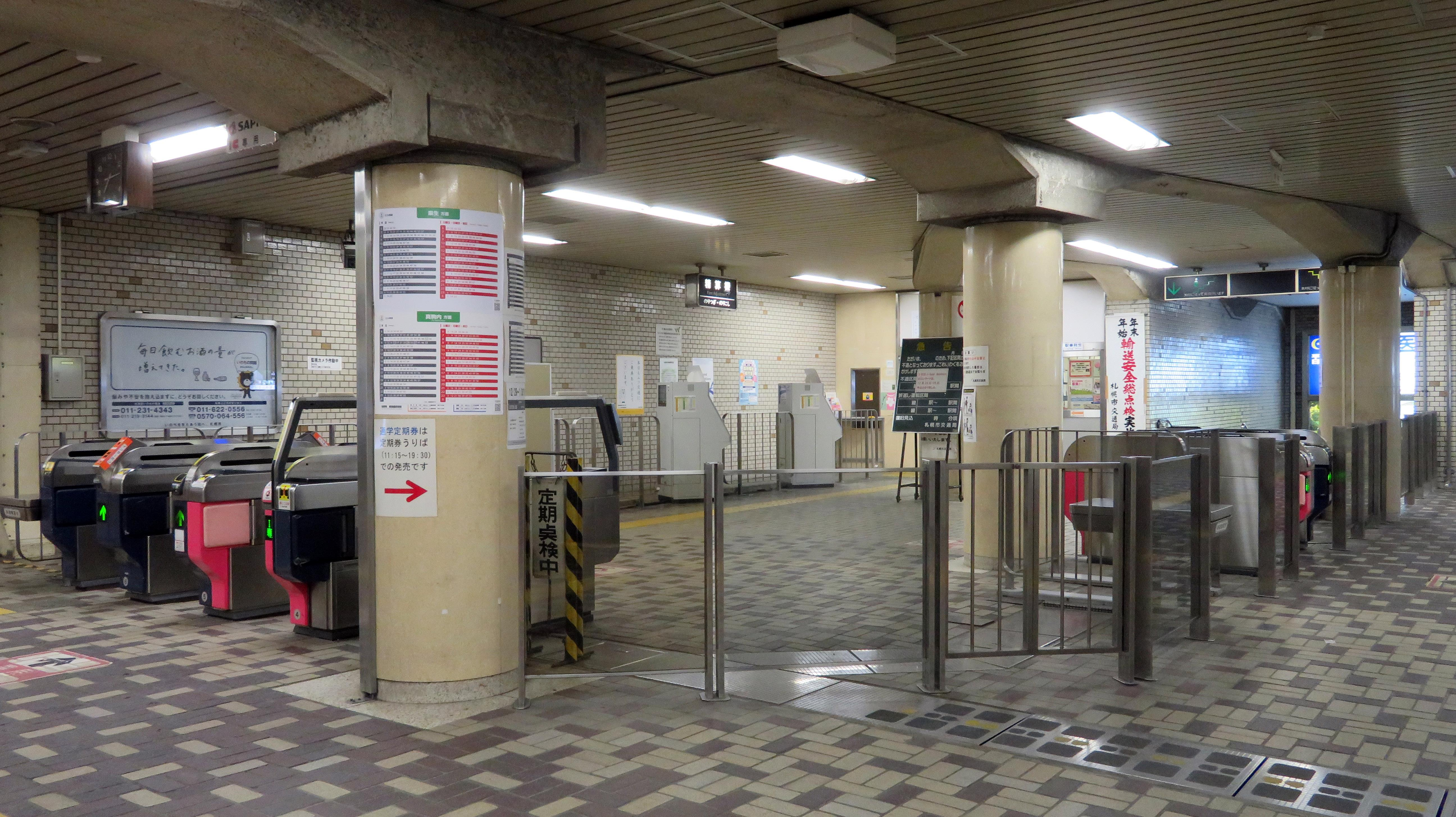 北24条駅改札口